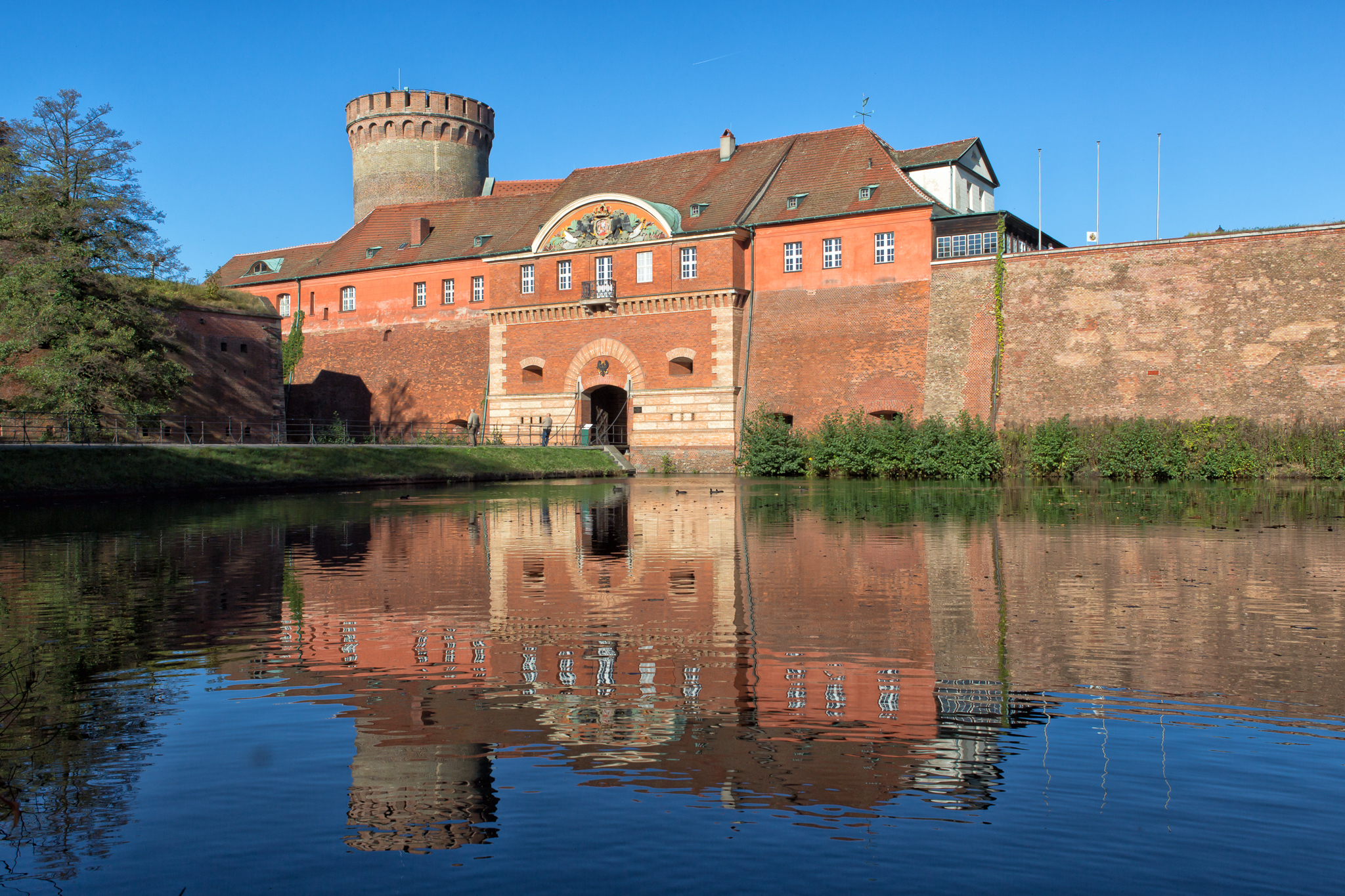 Zitadelle Spandau - Berlin - 2014 - Haupteingang Südseite